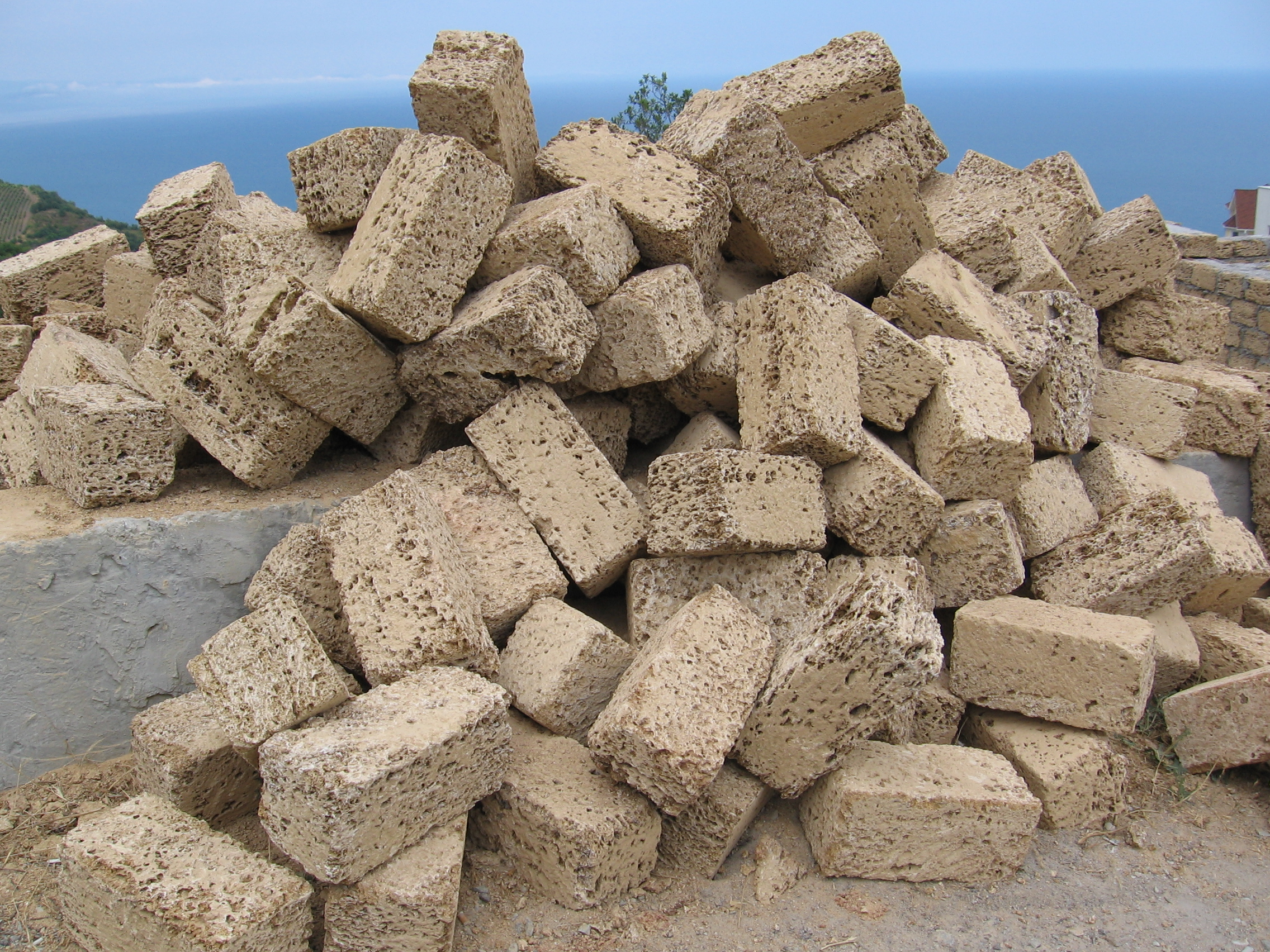 Фото